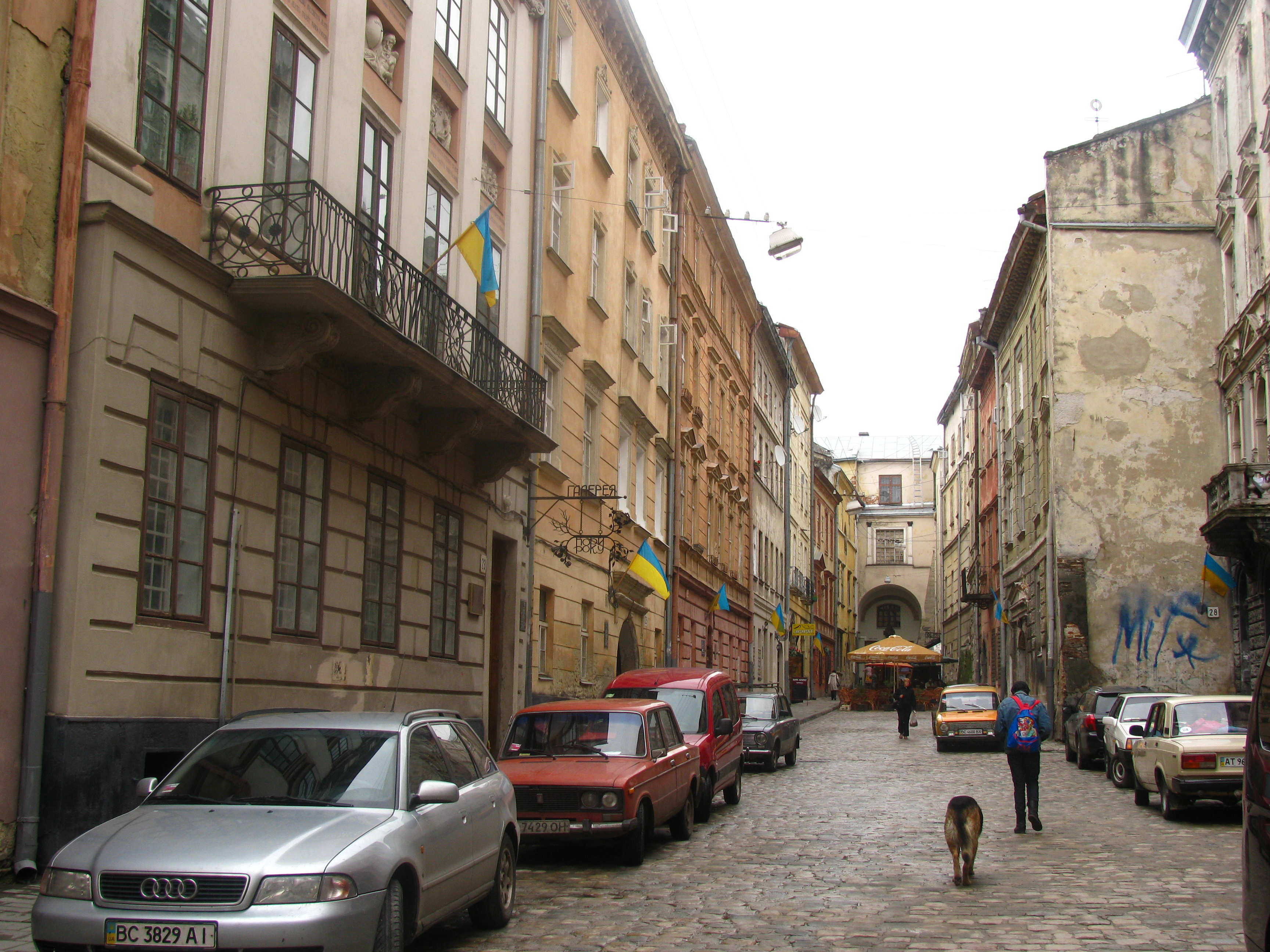 Вулиця Вірменська Львів.jpg: Вулиця Вірменська у Львові